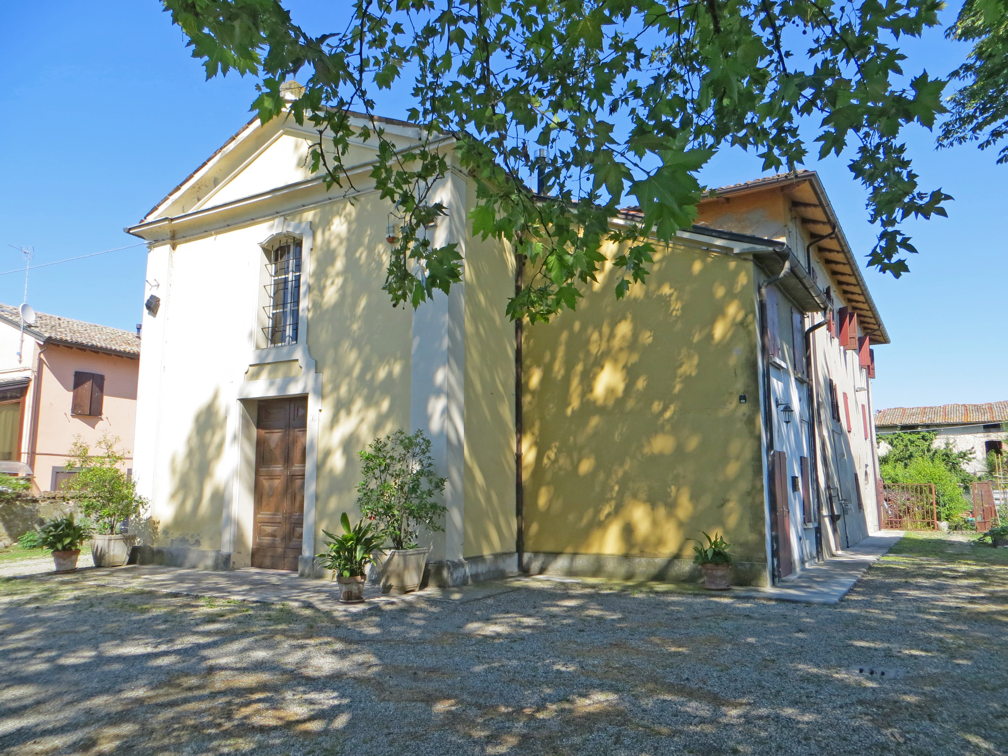 Chiesa di San Terenziano (Fraore, Parma) - facciata e lato sud